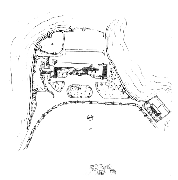 中文（台灣）: 國民精神研修所，位於台北市大直